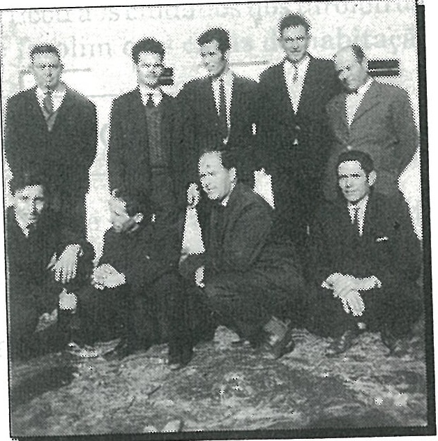 Foto dos Fundadores